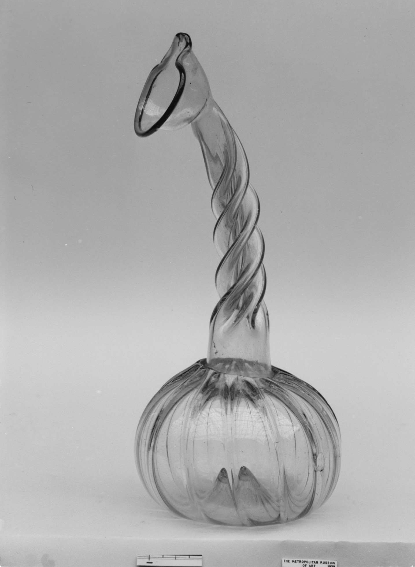 German; Bottle (Kuttrolf); Glass